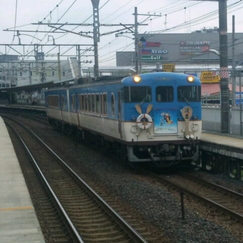 新井口駅を通過する清盛マリンビュー。走行中の画像を追加するために投稿しました。